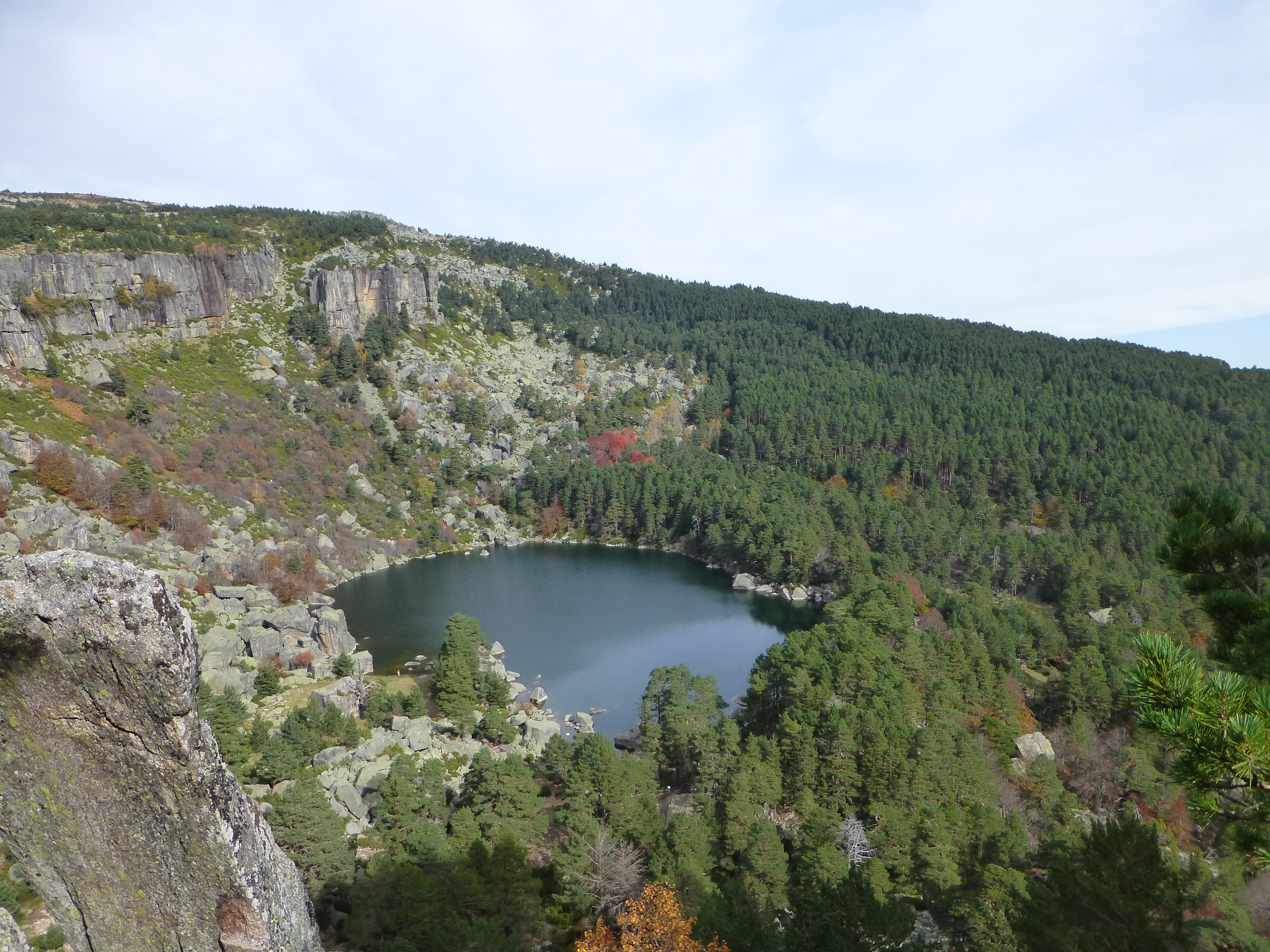 Laguna Negra de Urbión. Vista desde la senda del Portillo. Soria, España.